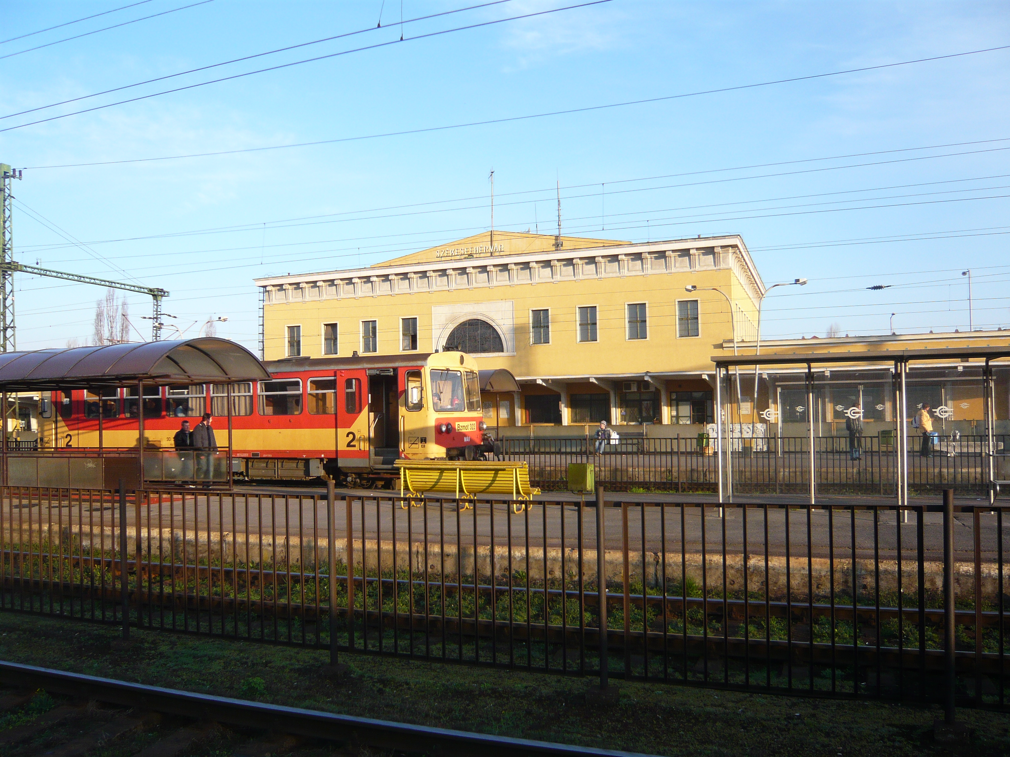 Székesfehérvár Station セーケシュフェヘールヴァール駅, Székesfehérvár,Hungary（セーケシュフェヘールヴァール,ハンガリー）でHide-spが撮影。